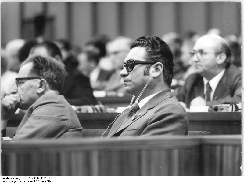 ADN-ZB Kollektiv 17.6.1971-bi-Berlin: VIII. Parteitag der SED. Aufmerksam verfolgt der Leiter der Delegation der Sozialistischen Partei Chiles, Alejandro Jiliberto Zepeda, stellvertretender Generalsekretär der Partei, Mitte, den Verlauf der Diskussion auf dem VIII. Parteitag der SED. (Reporter Junge, VIII-C)